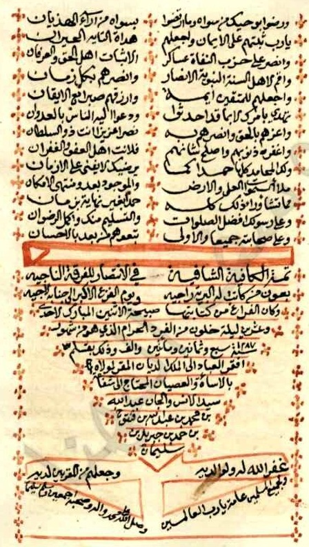 ختام نونية ابن القيم